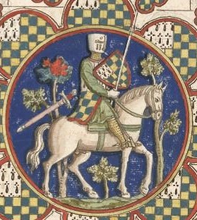 Pierre de Dreux